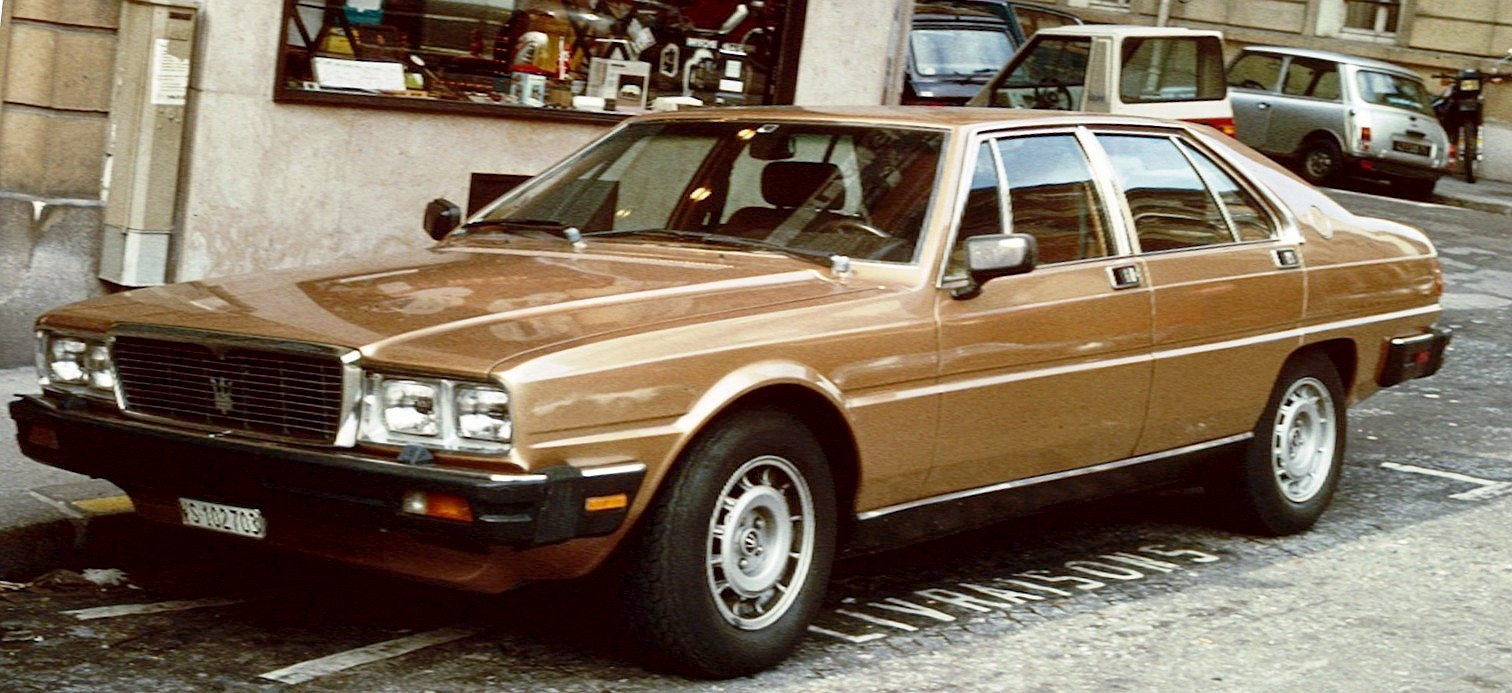 Maserati Quattroporte de Valais